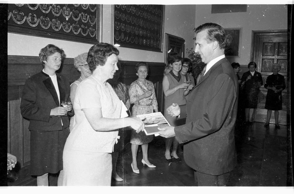 Empfang des Bundesvorstandes im Rathaus. Oberbürgermeister Bantzer überreicht der Abteilungsleiterin Frauen im DGB-Bundesvorstand, Maria Weber, das Buch "Farbiges Kiel".